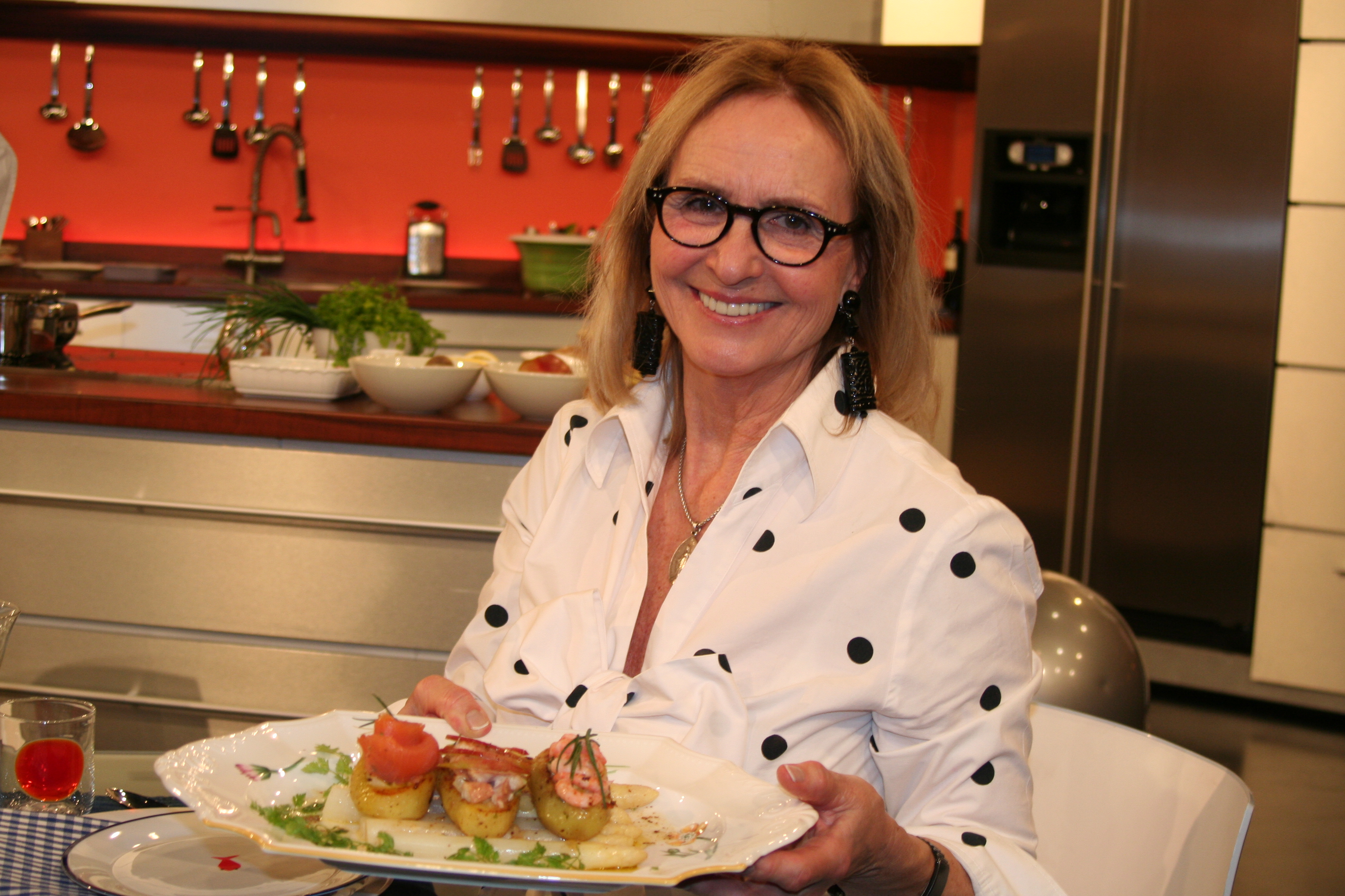 Diana Körner bei der Fernsehaufzeichnung Lafer! Lichter! Lecker!.